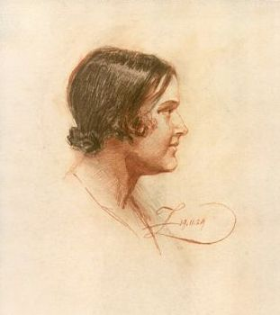 Zelma Brauere - Riharda Zariņa modele, kas attēlota uz vairākām starpkaru Latvijas lata naudas zīmēm un citos viņa darbos